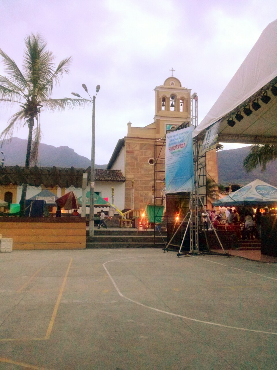 Parque central de labranzagrande